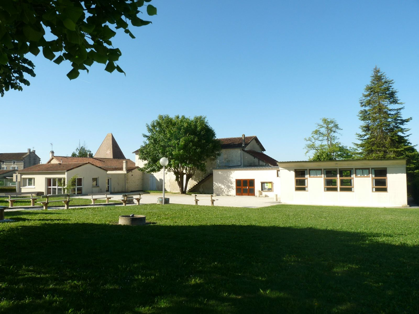 Salle des fêtes d'Aignes-et-Puypéroux (16), France. Derrière la mairie.